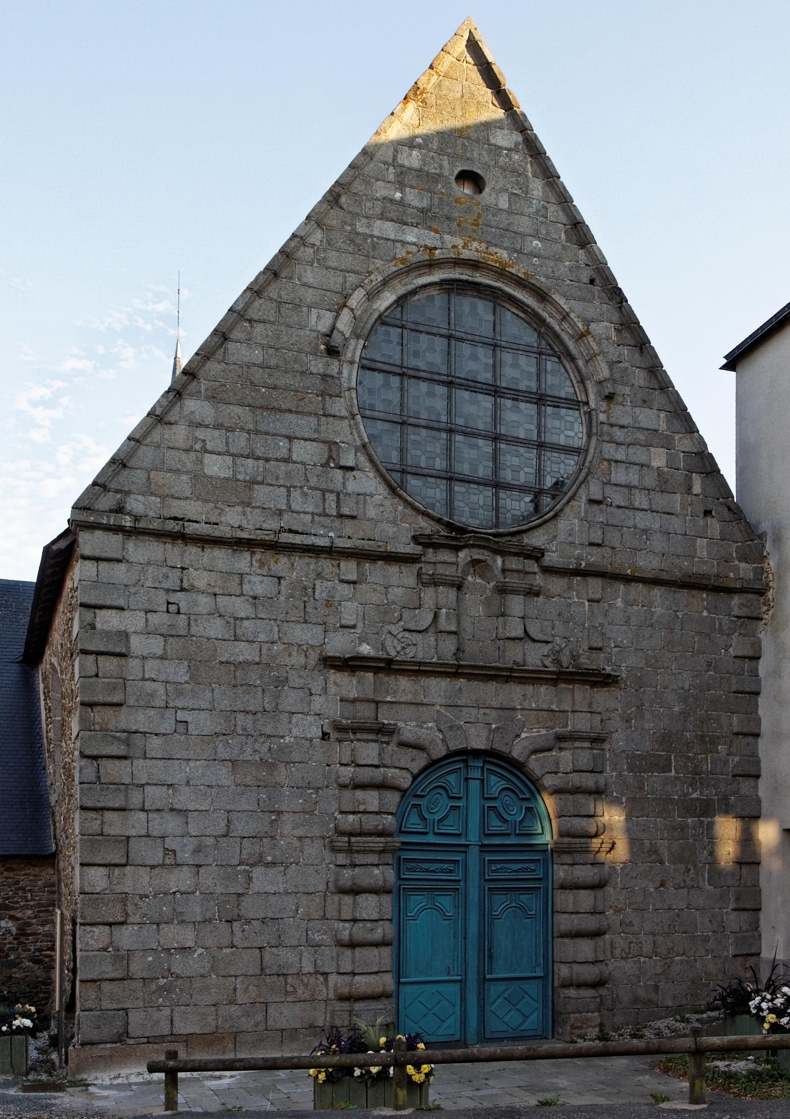 La chapelle des Calvairiennes à Mayenne.